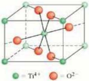 Rutiloaren egitura